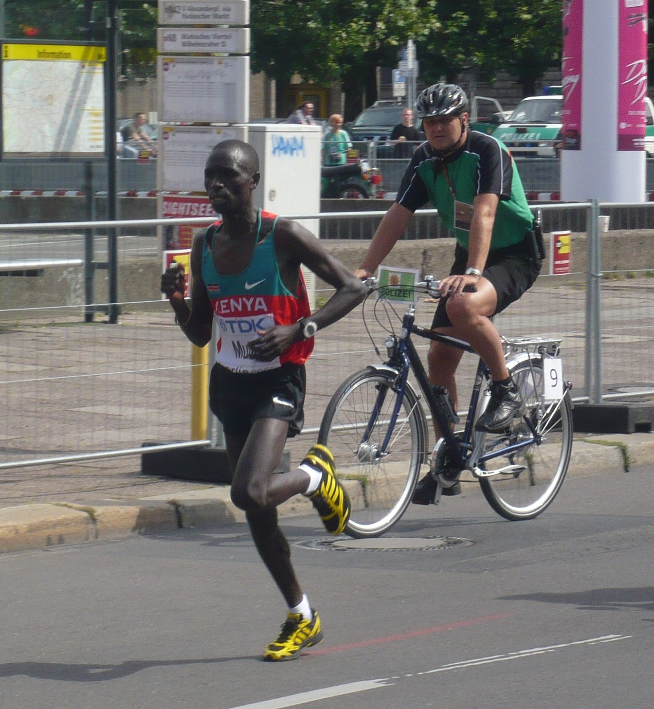 Leichtathletik Weltmeisterschaft, Berlin 2009, Marathon der Herren, der Kenianer Emmanuel Mutai am Kilometer 40, am Ende mit 2:07:48 Platz 2.